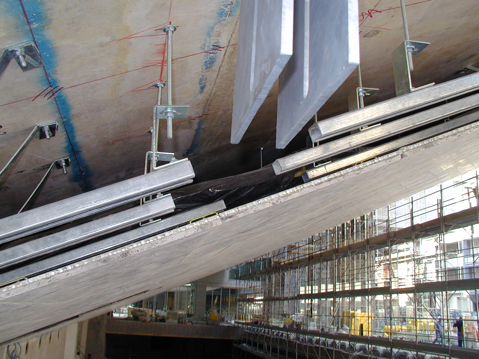 Fase di posa di Ceppo di Gré alleggerito per realizzazione contro soffitti inclinati Aula Magna Università Luigi Bocconi - Milano. Sistema di parete ventilata con ancoraggio meccanico e fissaggio con inserti. Lastre alleggerita e rinforzata con pannello alveolare.